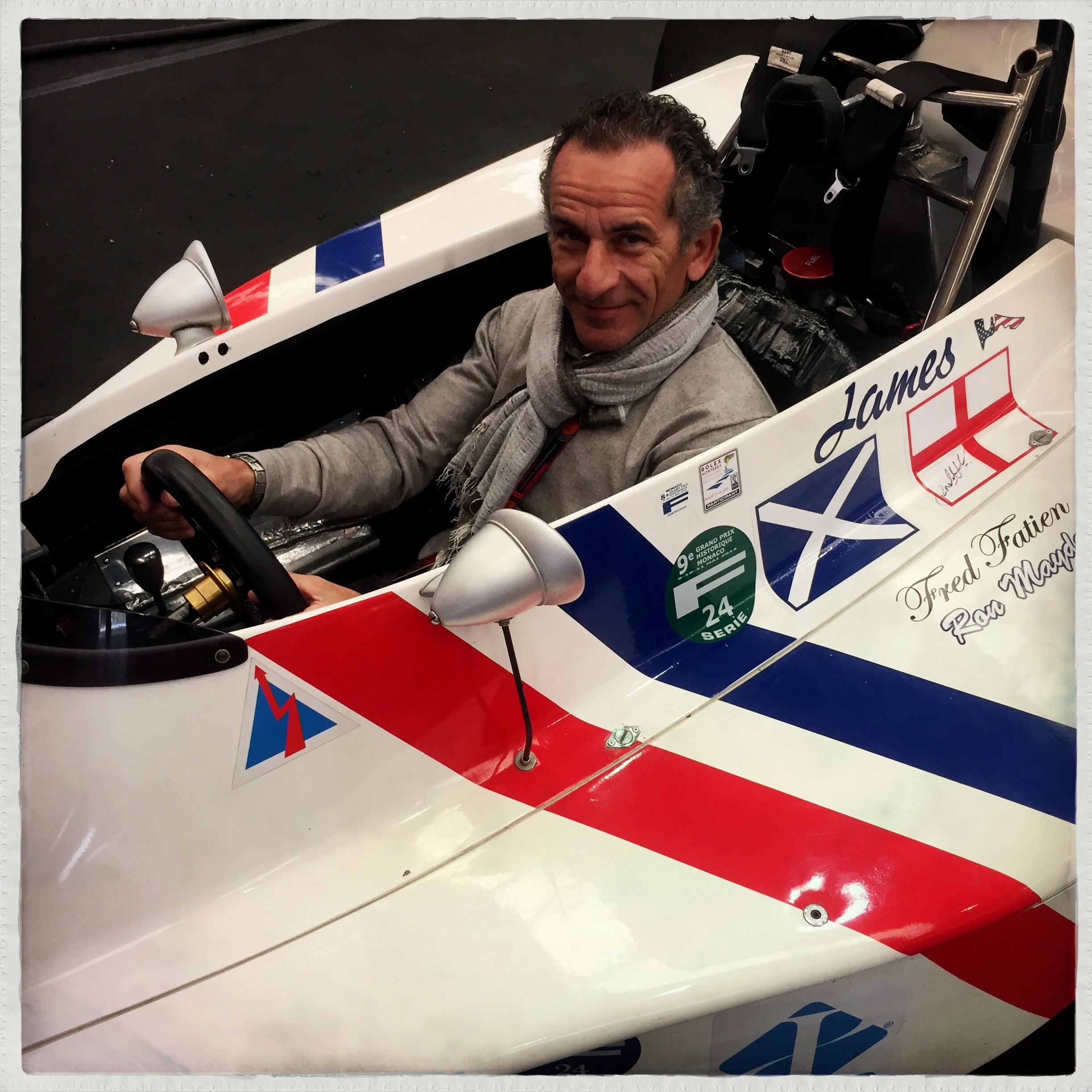 F1 historiques au GP du Mexique F1 2015